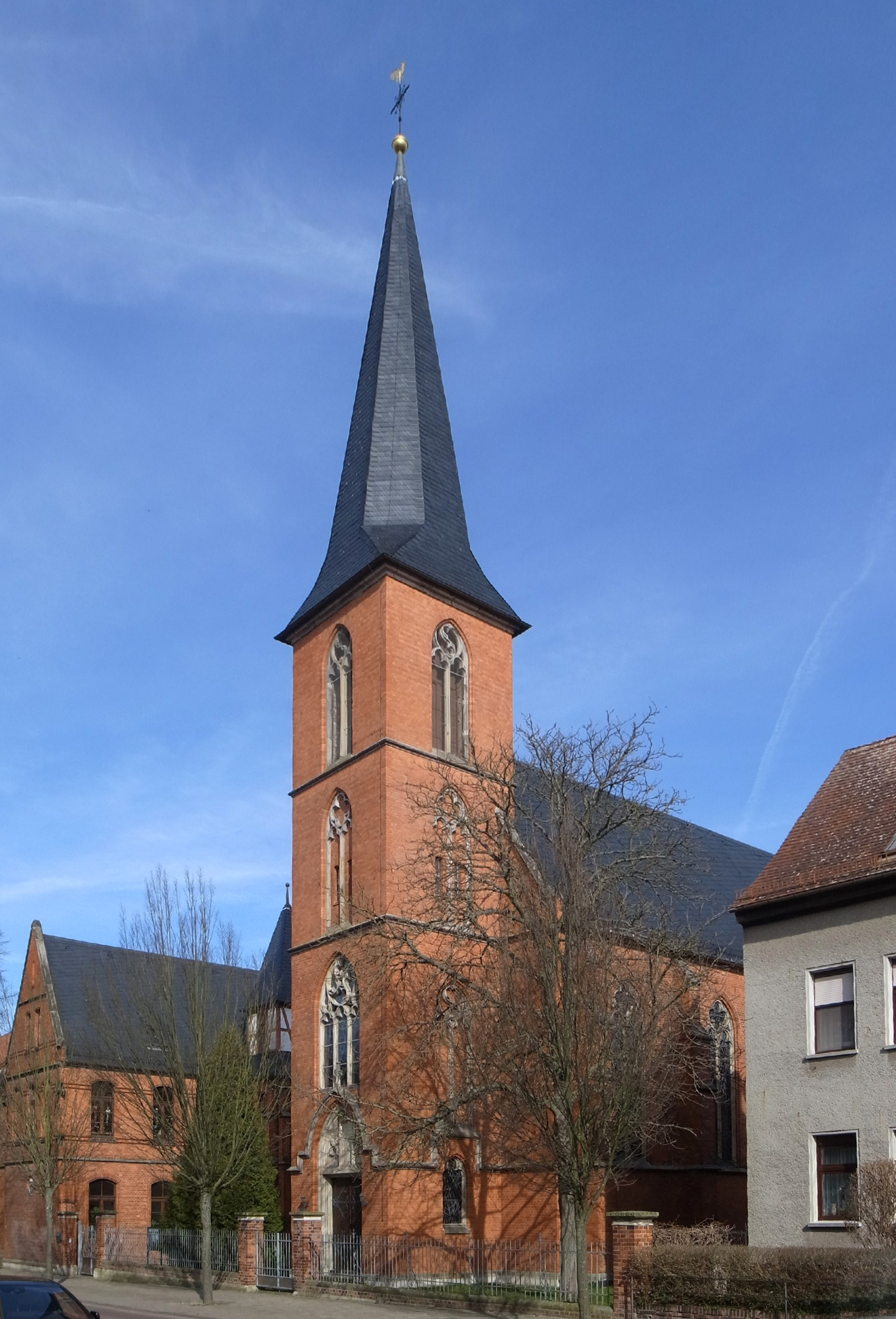 Zerbst, Kath. Kirche St. Jacobus